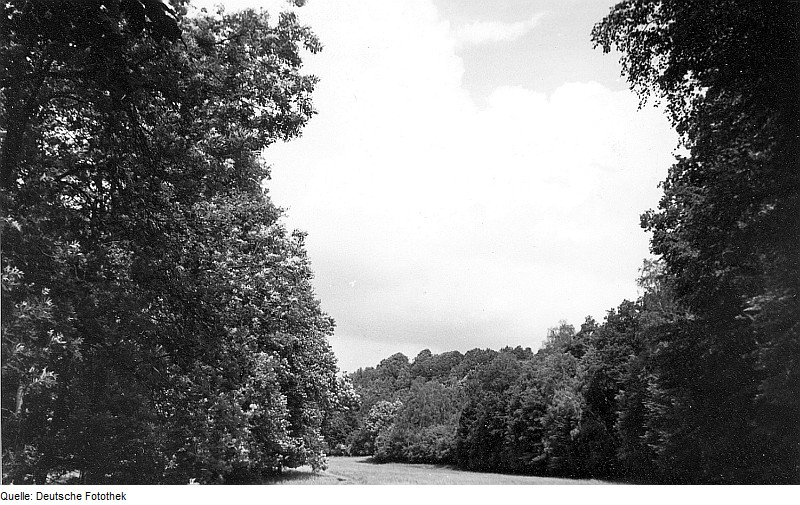 Original image description from the Deutsche FotothekTriebischtal-Schmiedewalde. Eingang zum Schmiedewalder Tal